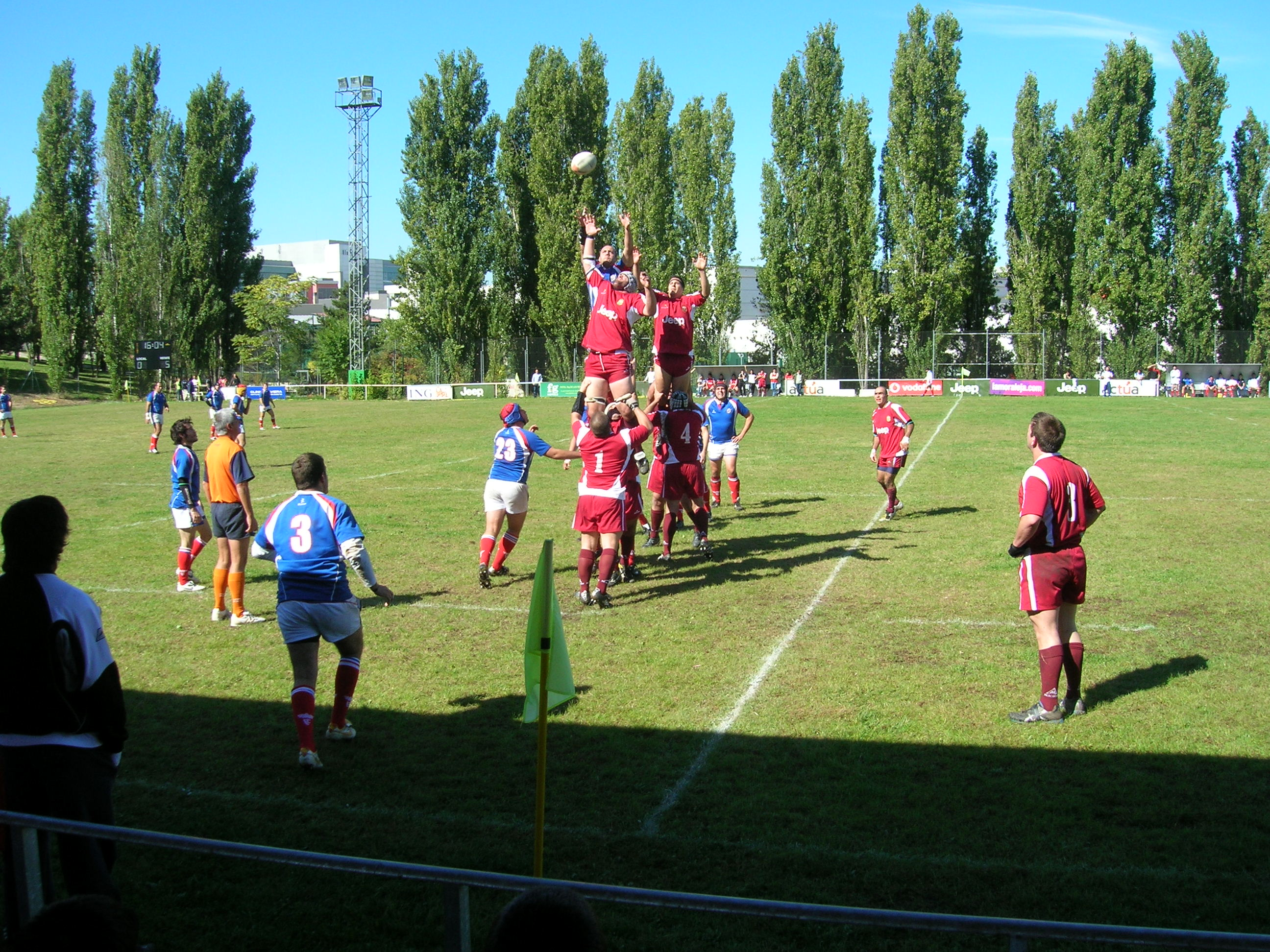 Touch durante partido entre Alcobendas Rugby y Liceo Francés